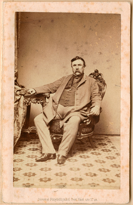 Deák Ferenc 1861-ben. Simonyi Antal fényképfelvétele Hungarian National Museum Native nameMagyar Nemzeti MúzeumLocationBudapest, HungaryCoordinates47° 29′ 28″ N, 19° 03′ 46″ E Established1802WebsiteHungarian National Museum